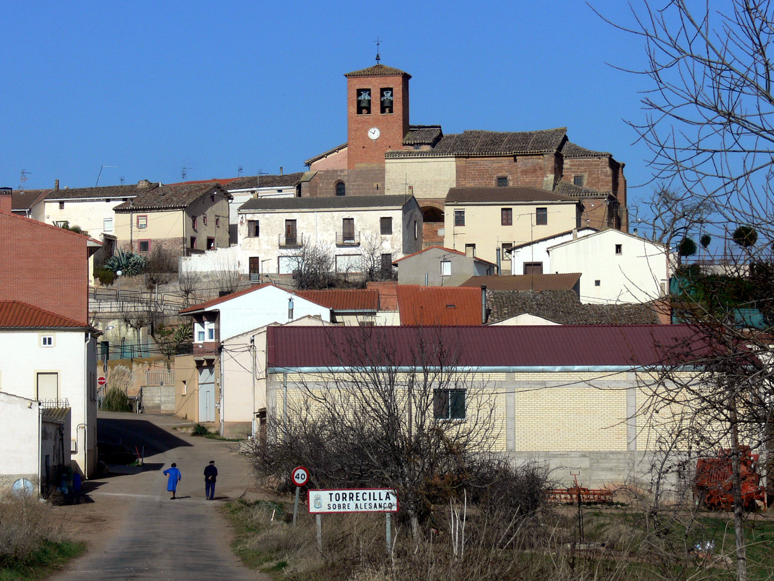 Torrecilla sobre Alesanco, municipio de La Rioja (España)